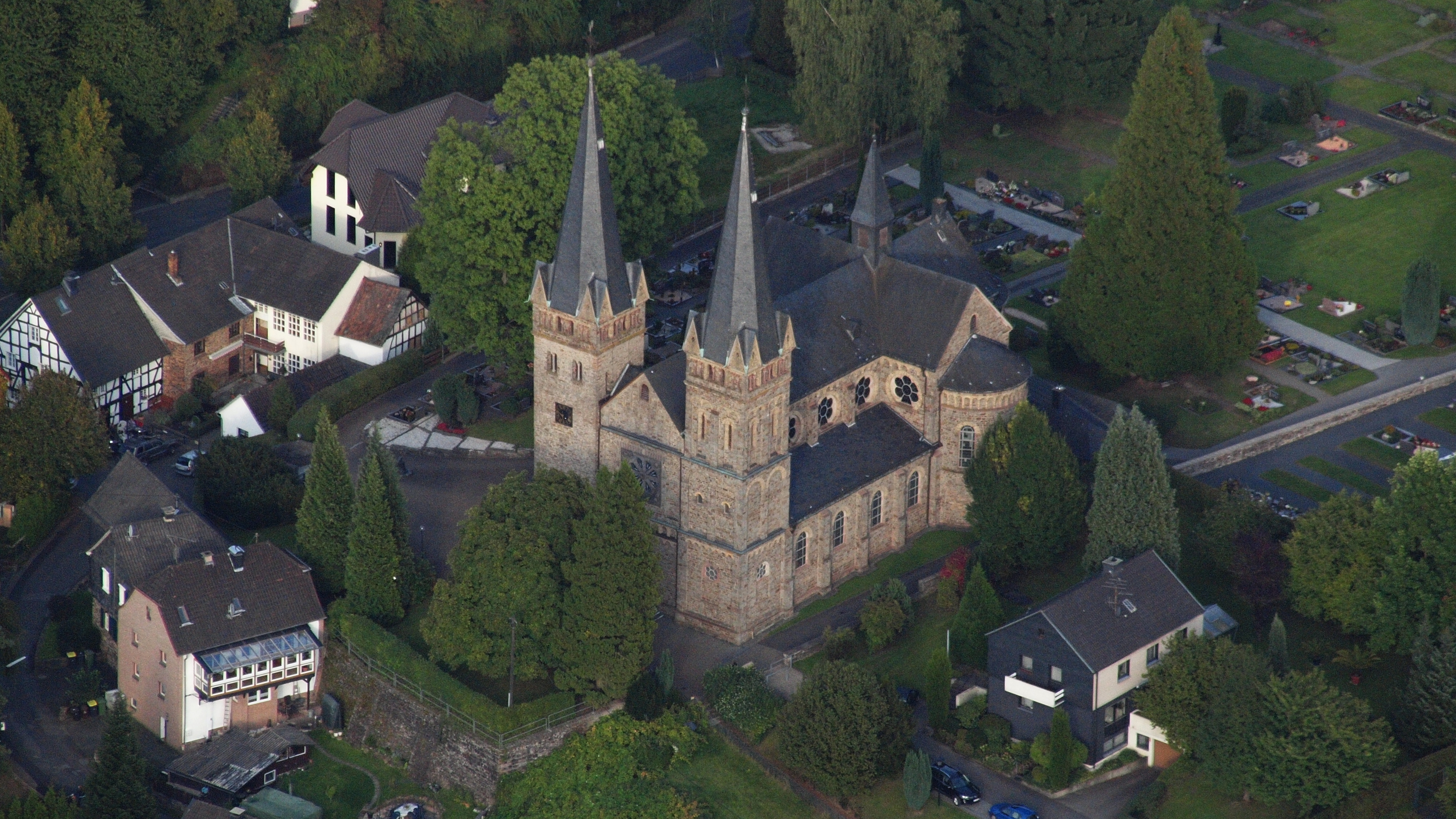 Katholische Pfarrkirche St. Laurentius, Windeck-Dattenfeld: Luftaufnahme